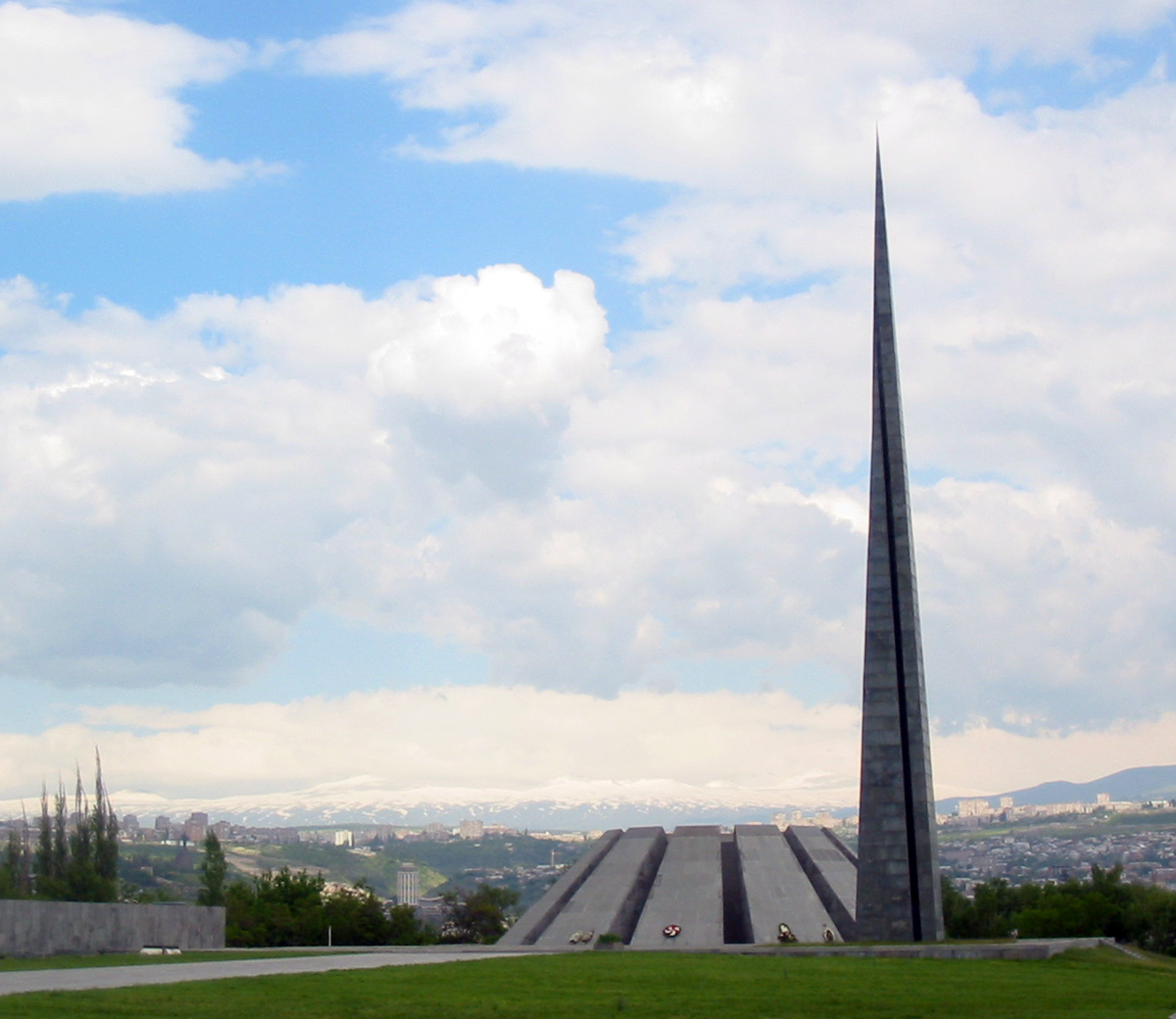 Tsitsernakapert Erevan, Arménie